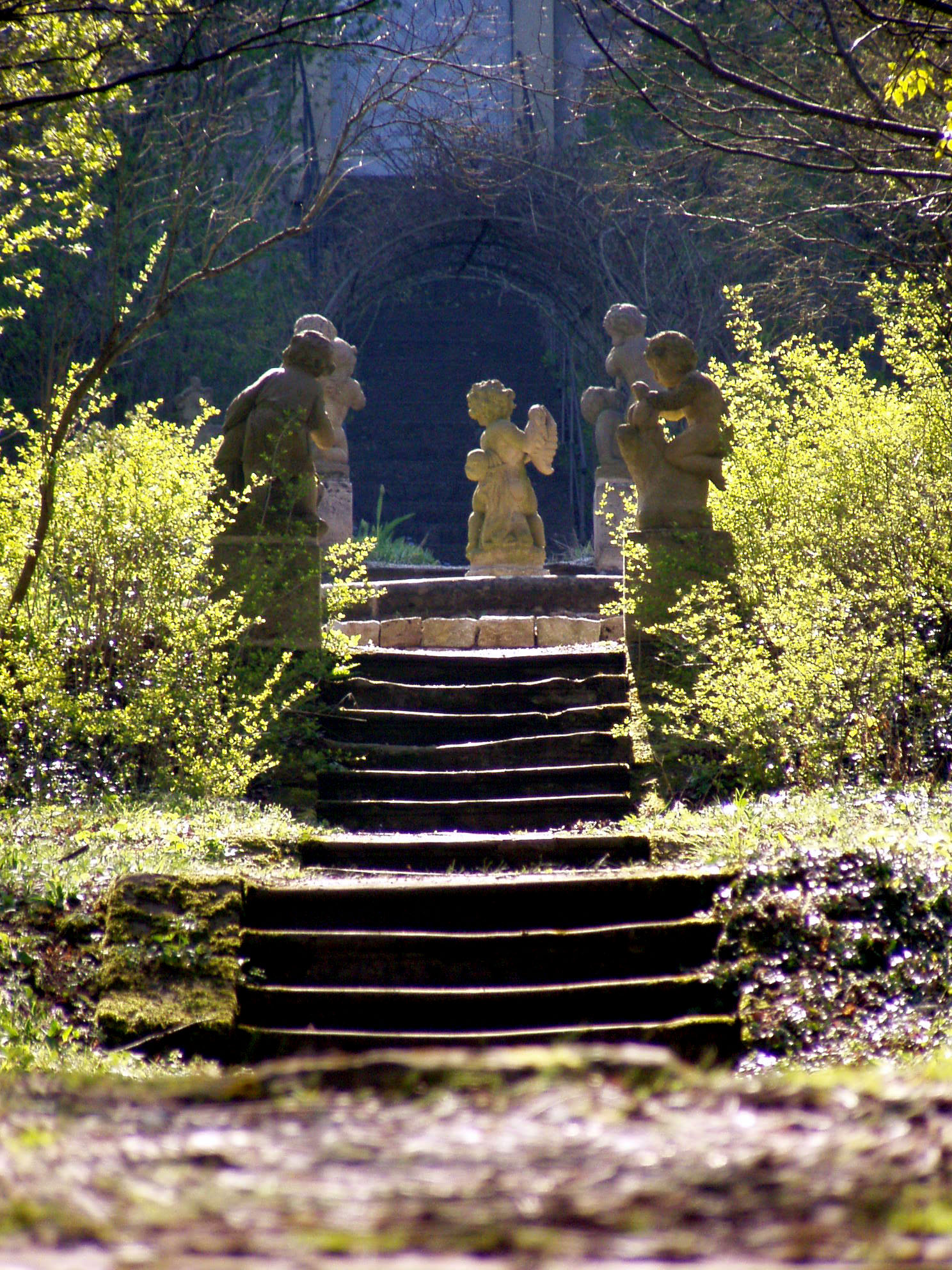 Im Puttengarten von Schloss Schwanberg / Unterfranken